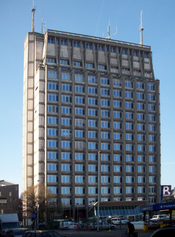 Politietoren, Oudaan, Antwerpen